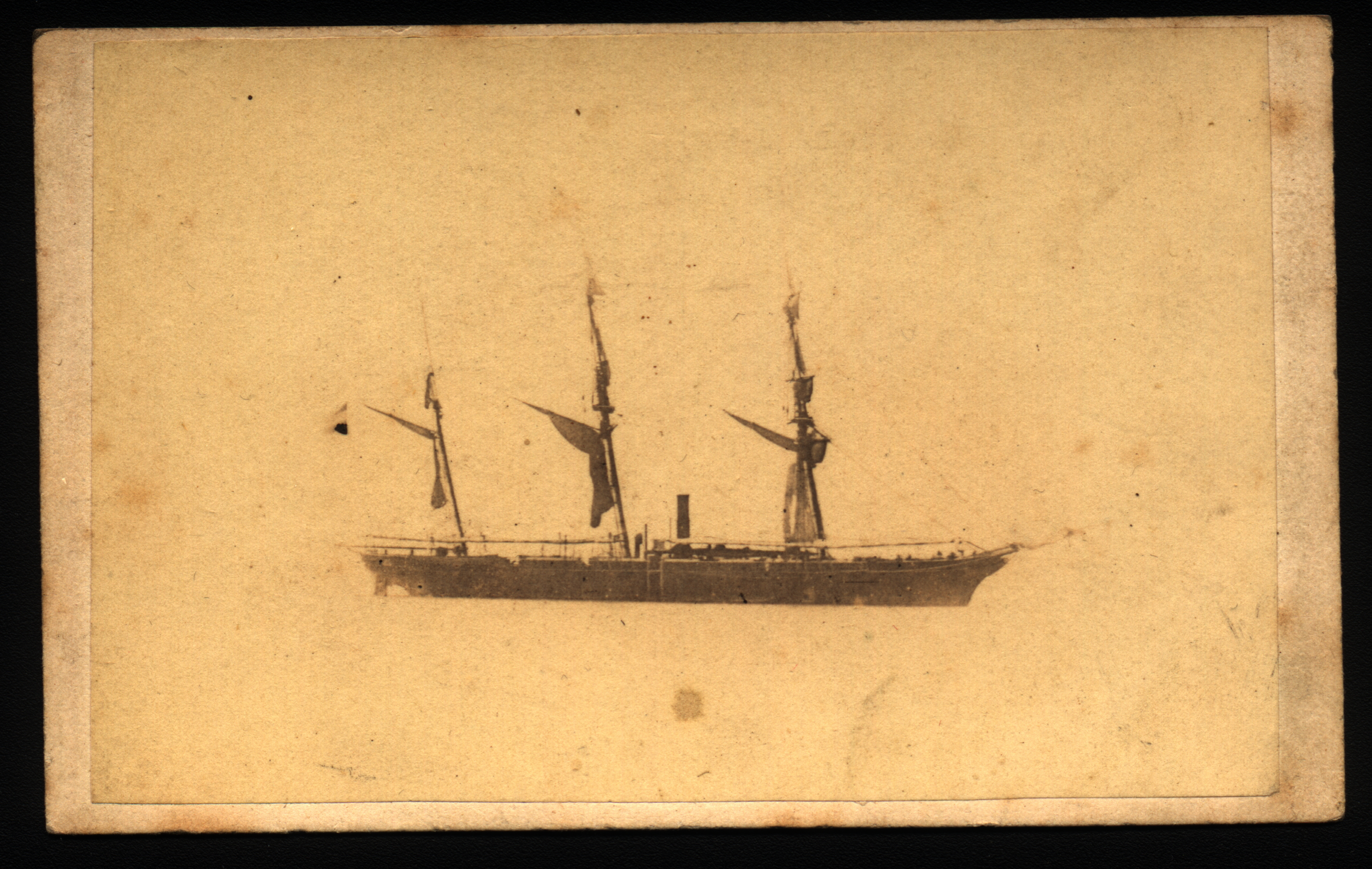 Scan van oude foto met een afbeelding van hoogst waarschijnlijk het schip de "Zijner Majesteits Schroefstoomschip Reinier Claeszen", of wel "Z.M.Stoomschip Reinier Clasezen"